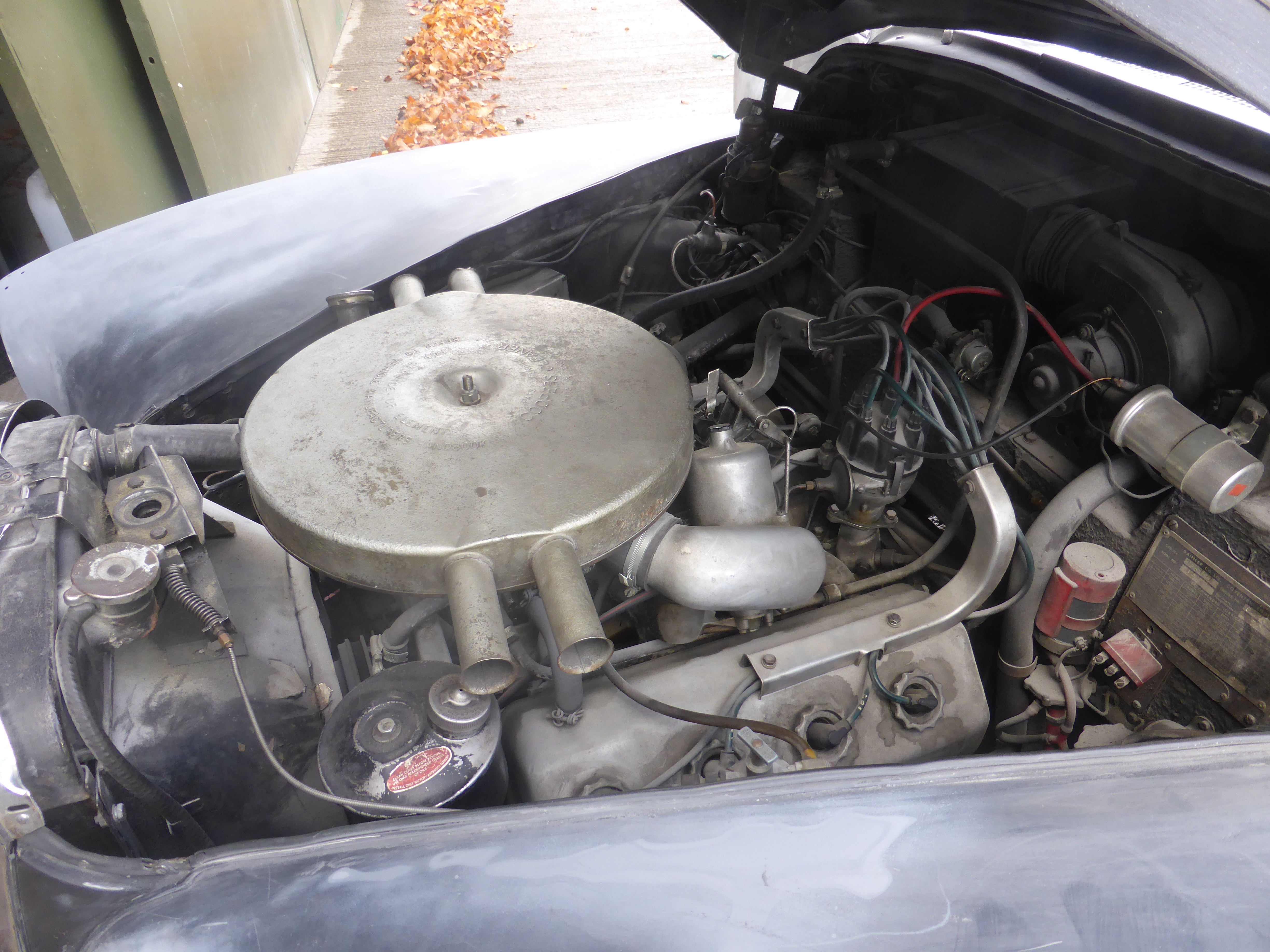 .uk/index.html